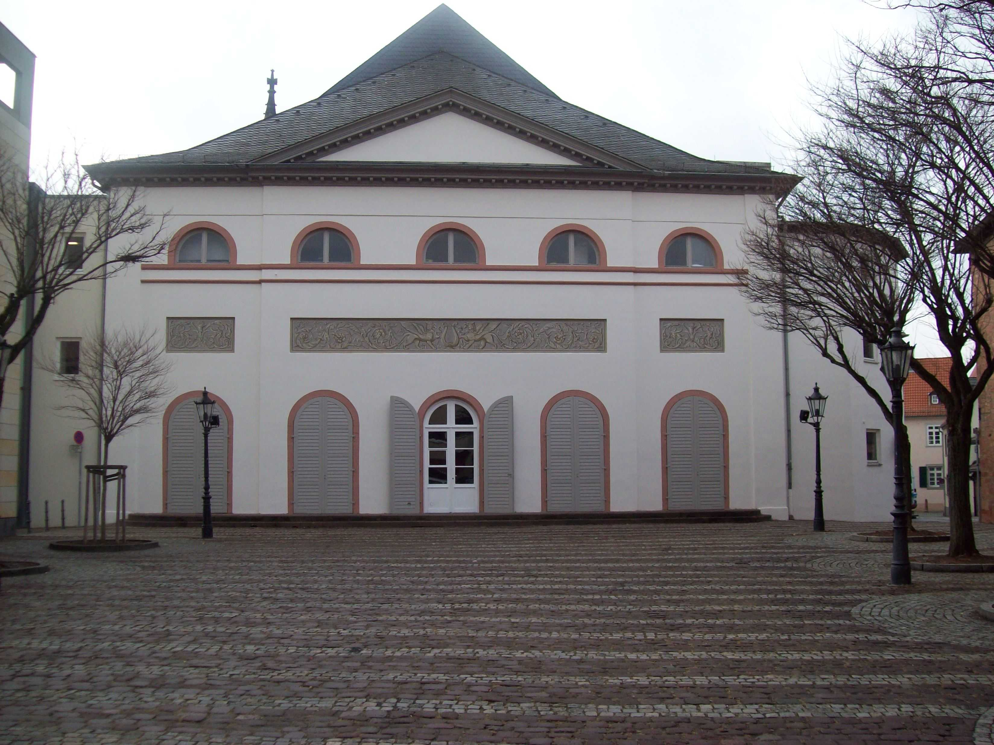 Stadttheater Aschaffenburg zum Karlsplatz, Eingang zum Deutschhaussaal, im Krieg zerstört heute Hinterbühne (Kulisseneingang)